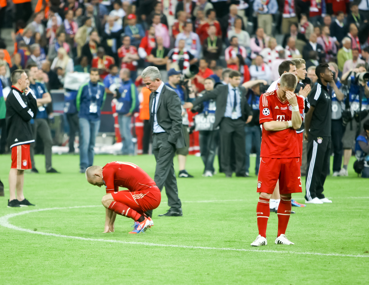 RA1_6539